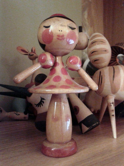 дерево